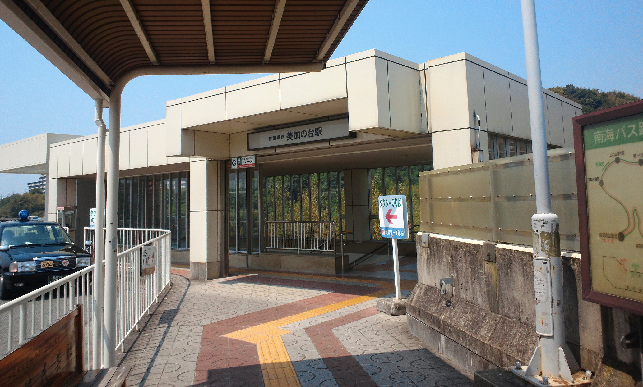 南海美加の台駅東出口